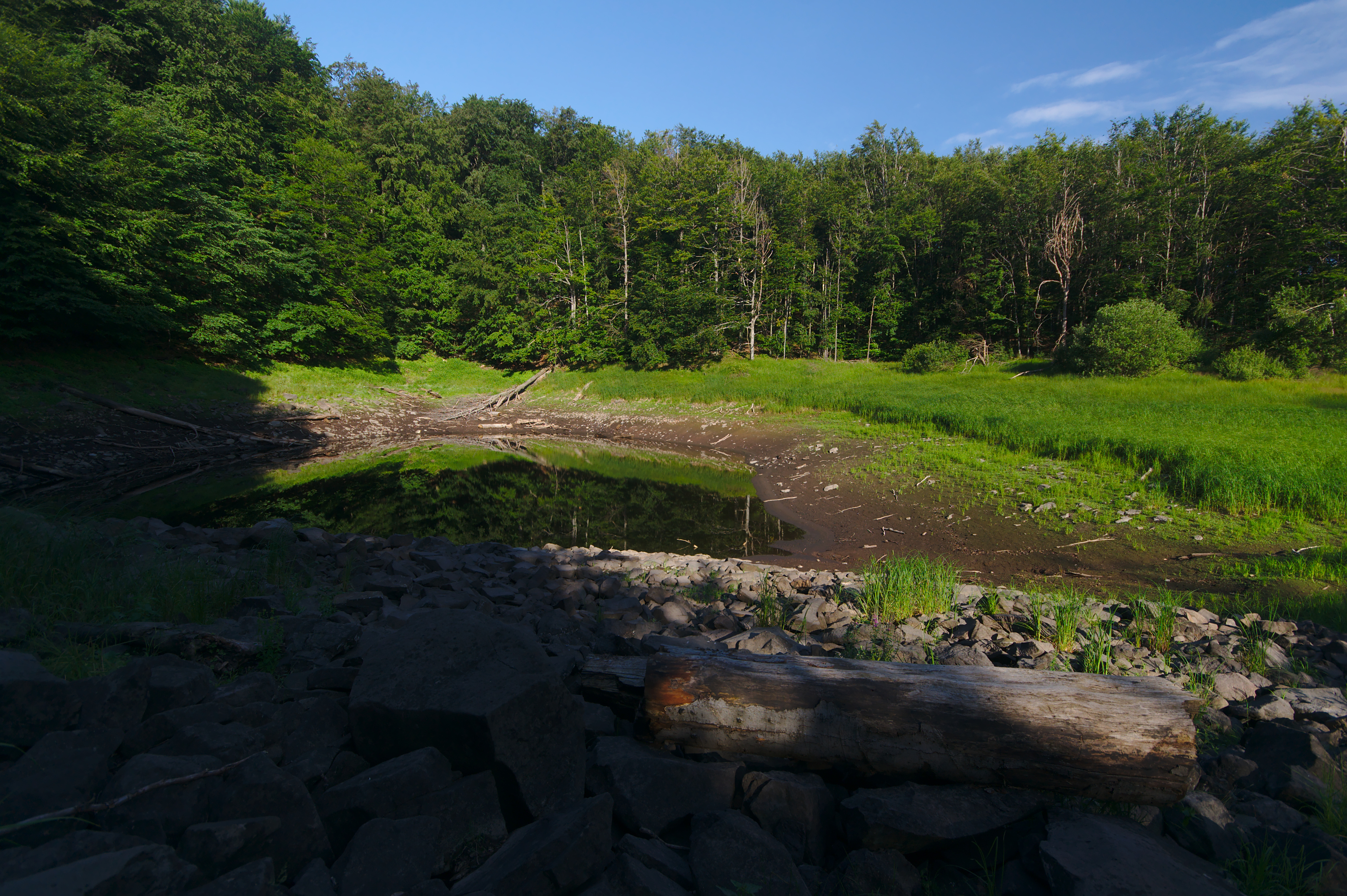 Národná prírodná rezervácia Motrogon - Kotlík, CHKO Vihorlat